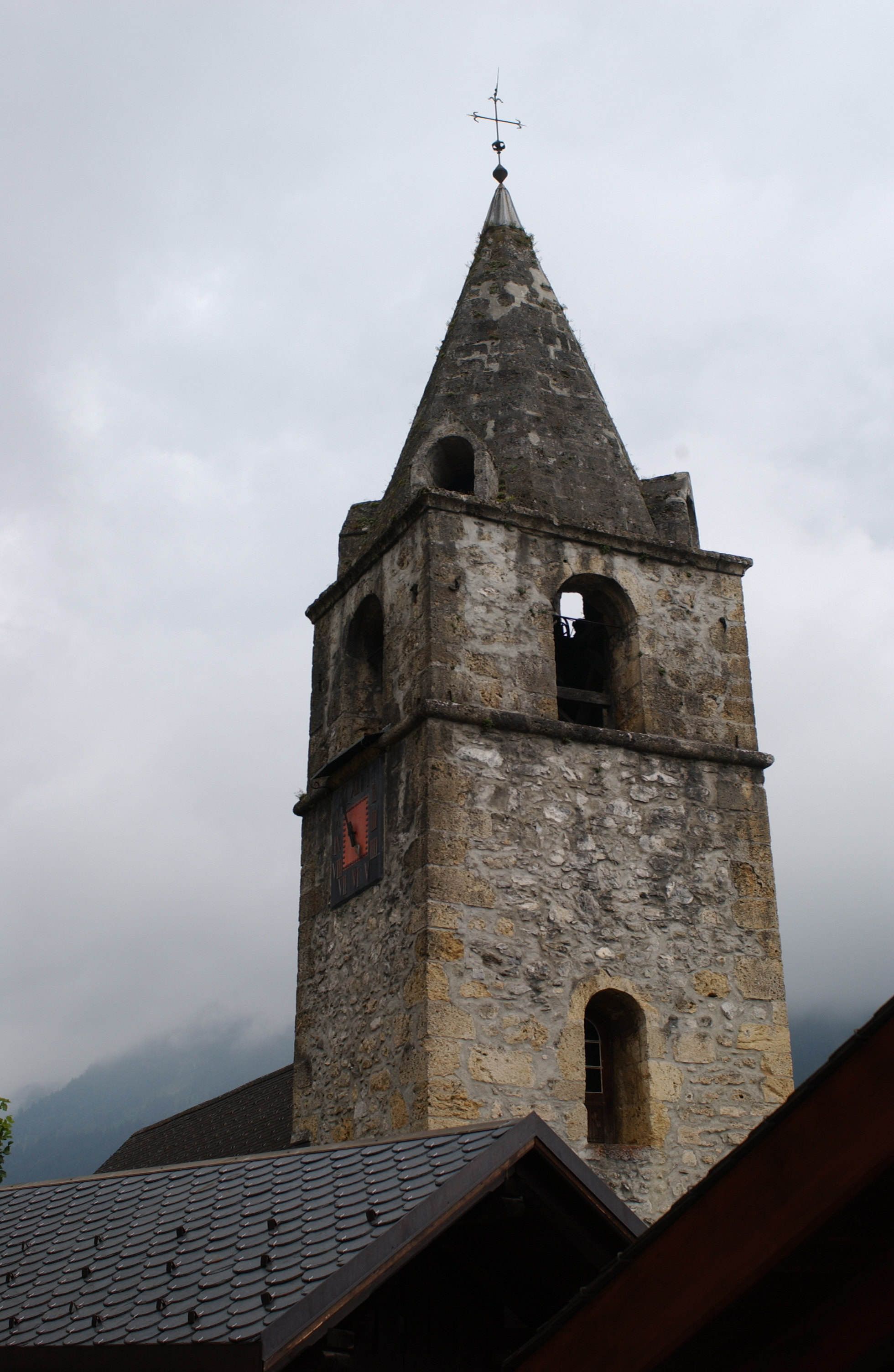 Vue de Gryon (Vaud).